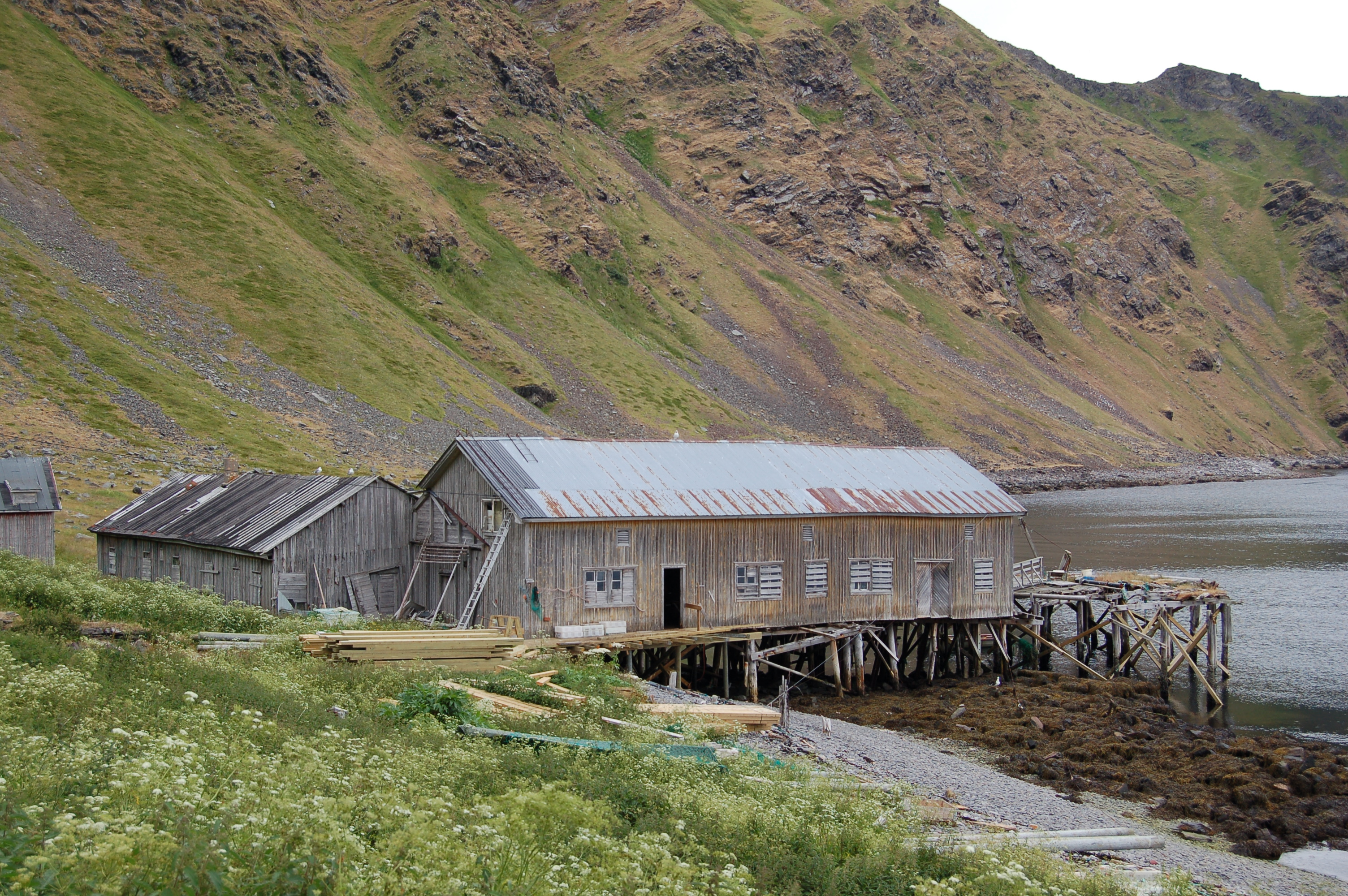 Kjelvik brygge, Nordkapp kommune.